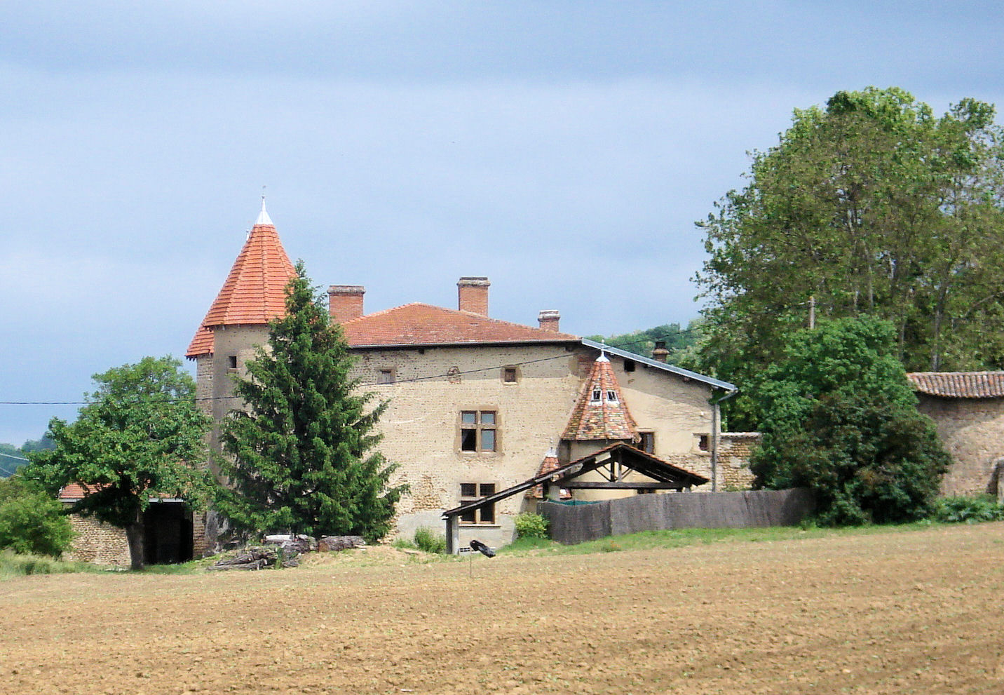 château du Cros à Anneyron dans la Drôme